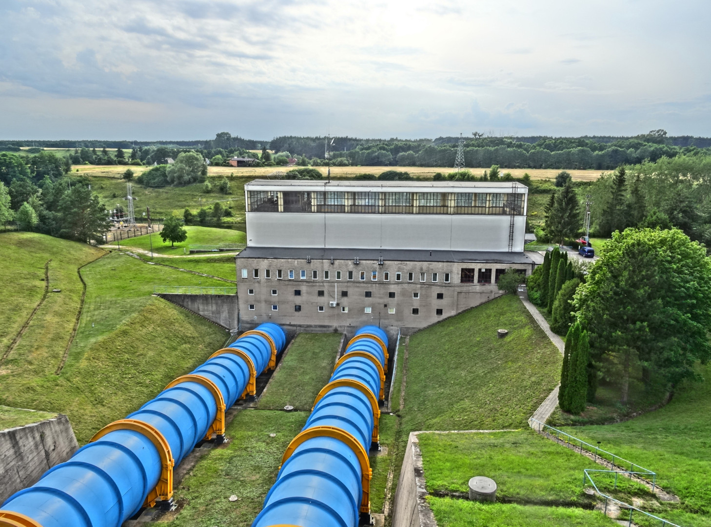 Elektrownia wodna na Brdzie w Samociążku koło Koronowa